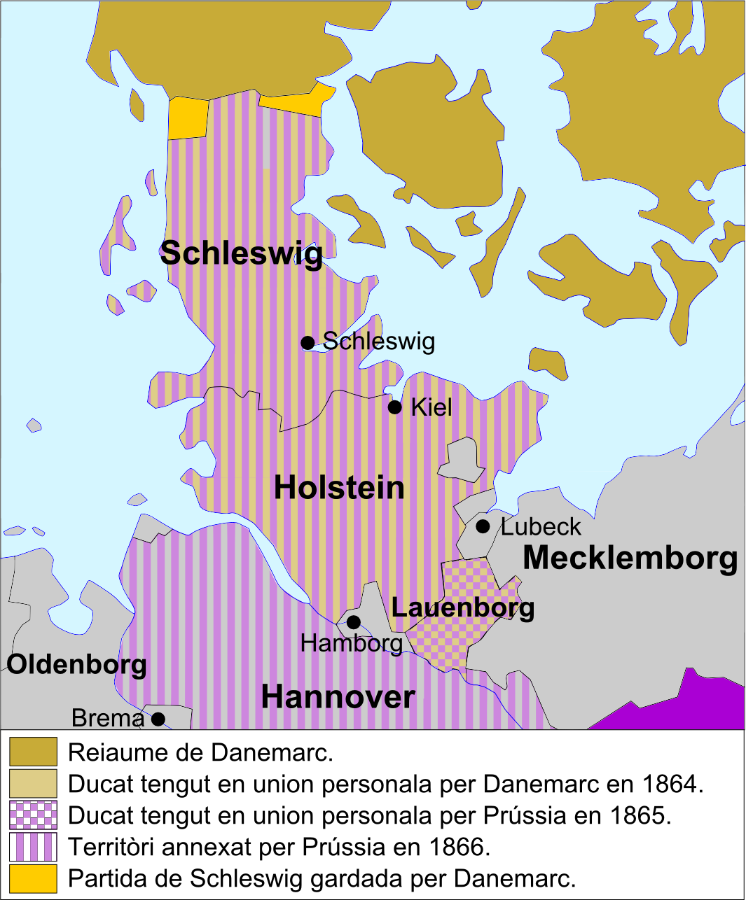 Pèrda dei Ducats per Danemarc entre 1864 e 1866.